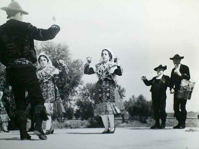 Charros bailando